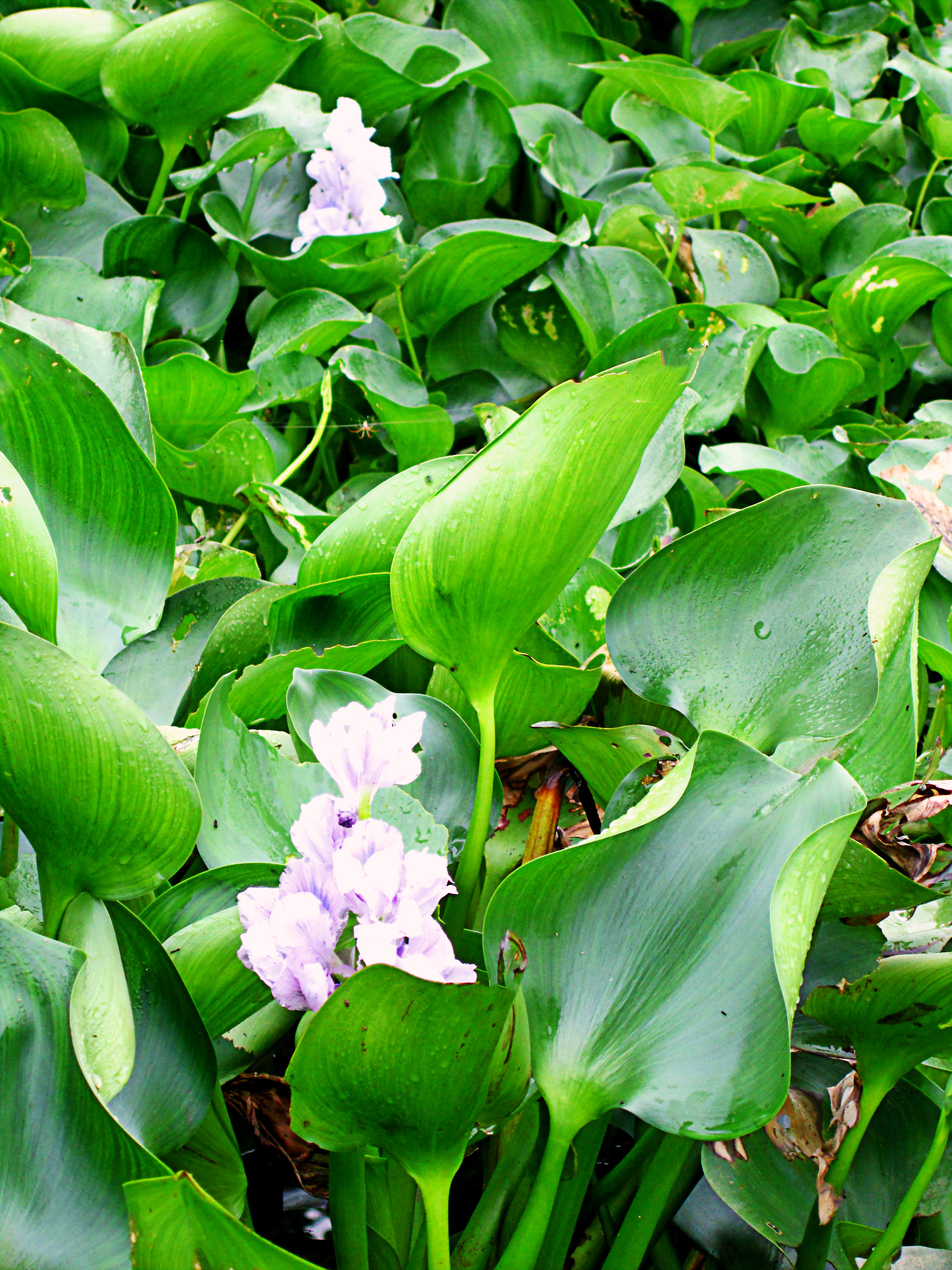 Bèo tây còn được gọi là lục bình.